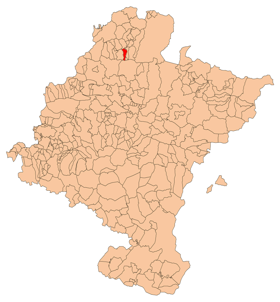 Urrotz herriaren kokapena Nafarroako mapan.